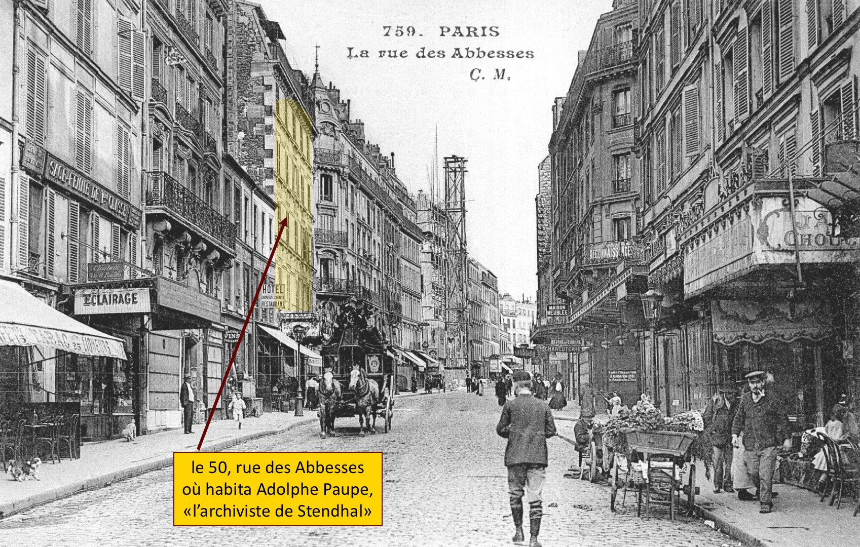 Localisation du domicile d'Adolphe Paupe au 50, rue des Abbesses, vers 1910.